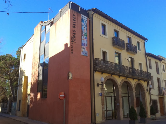 Casal Daurella, actual seu del Museu-Arxiu Tomàs Balvey de Cardedeu